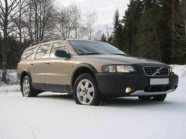 2003 Volvo XC70 Description Volvo XC70 de 2003 Source Photo faite par moi-même